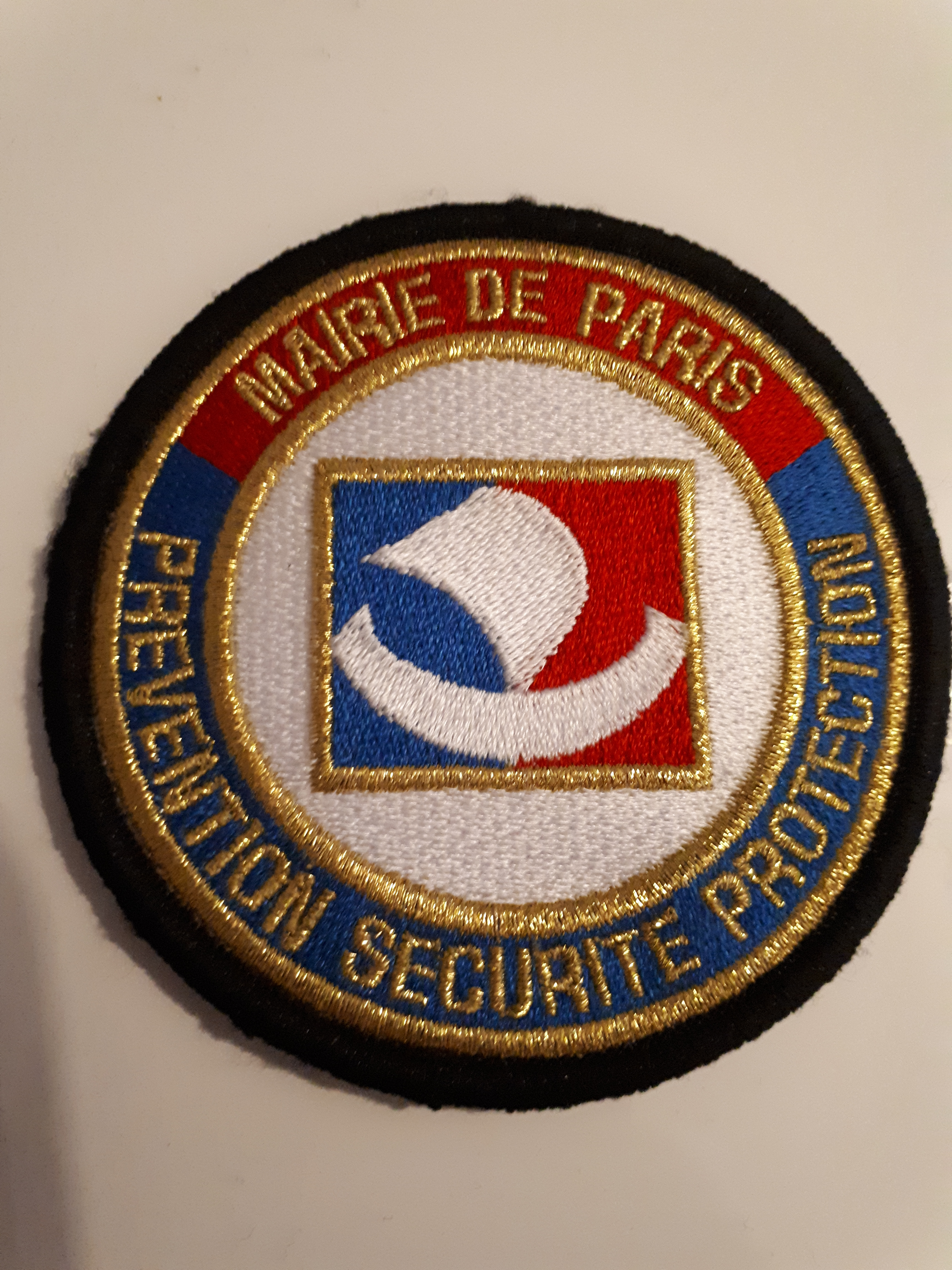 Écusson de la DPSP depuis septembre 2016. Fonctionnaire de la Ville de Paris chargé d'un service de police.